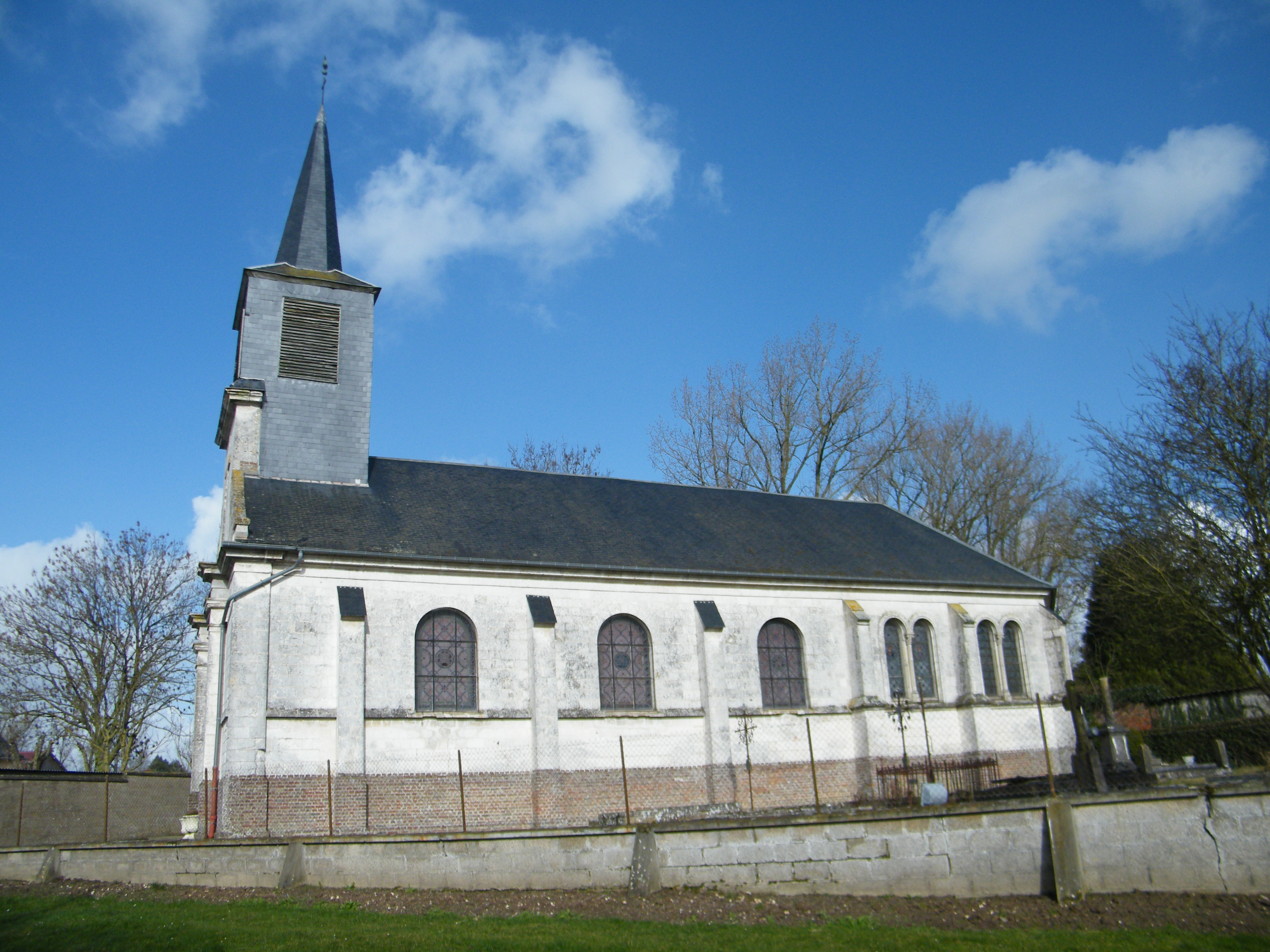 L'église.